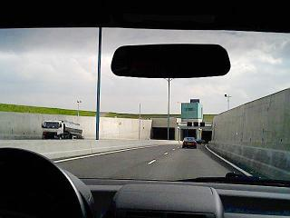 Westerscheldetunnel. Eigen foto.